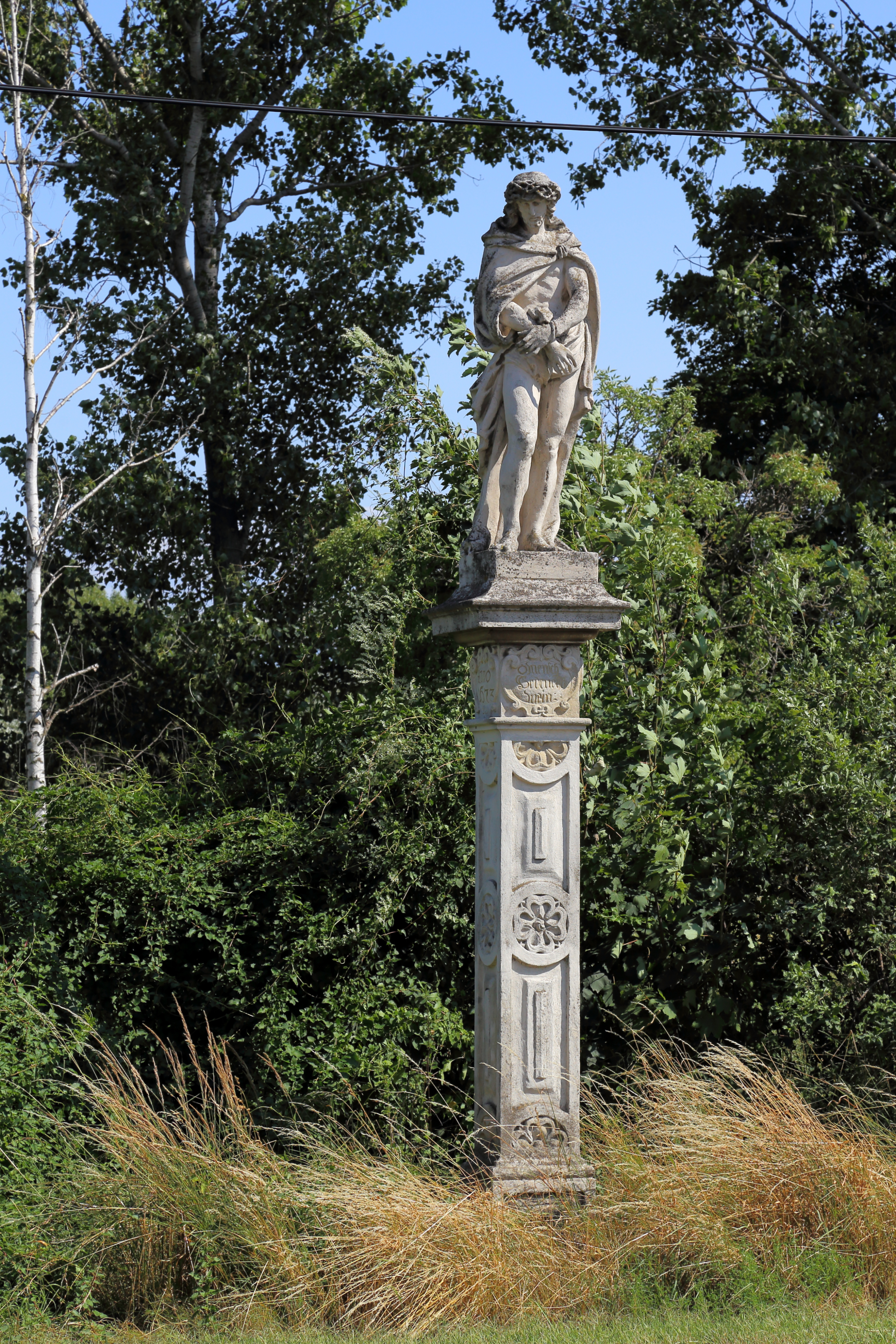 Schmerzensmann-Bildstock nächst Brünner Straße 315 in Stammersdorf, ein Ortsteil des 21. Wiener Gemeindebezirkes Floridsdorf. Eine Christusfigur mit Dornenkrone und gefesselten Händen auf einem ornamentierten Vierkantpfeiler mit Inschriftenkartuschen über einem schwachen Gesimse, datiert mit 1673. Die Inschriften lauten: „Anno 1673“, „O Mensch Gedenckh mein“, „Zur Ehr Gottes gemacht“ und „Frantz Hieß In Wien“.